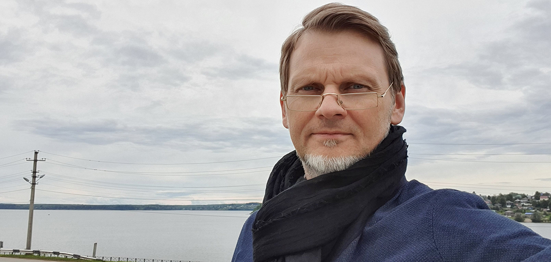 Дмитрий Трофимов, 2019 год, руководитель творческой мастерской "Царьград"